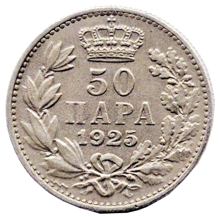 Srpski (latinica): Revers 50 para iz 1925, Kraljevina Srba, Hrvata i Slovenaca.